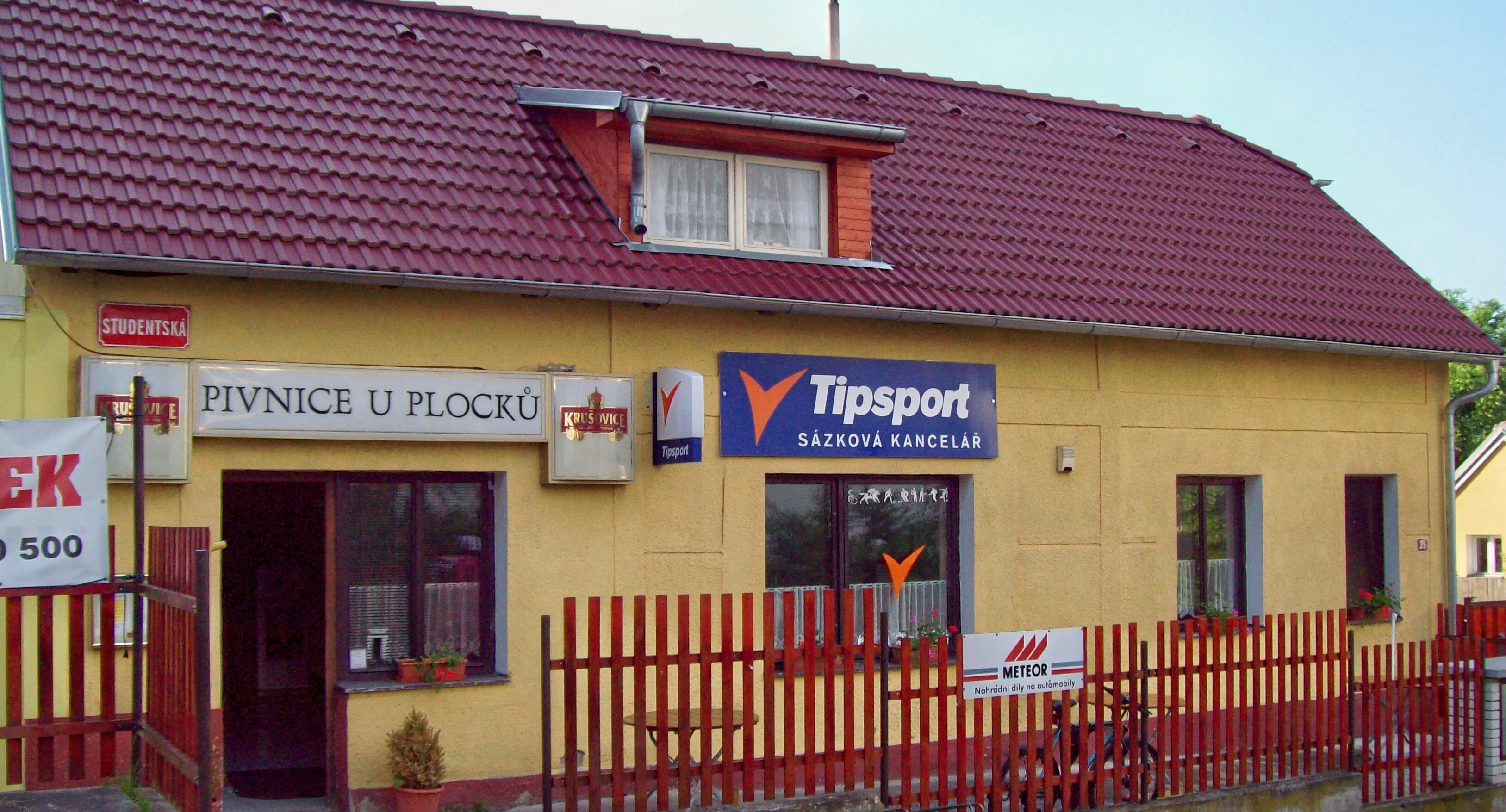 Pivnice U Plocků, Studentská ulice, Mělník.